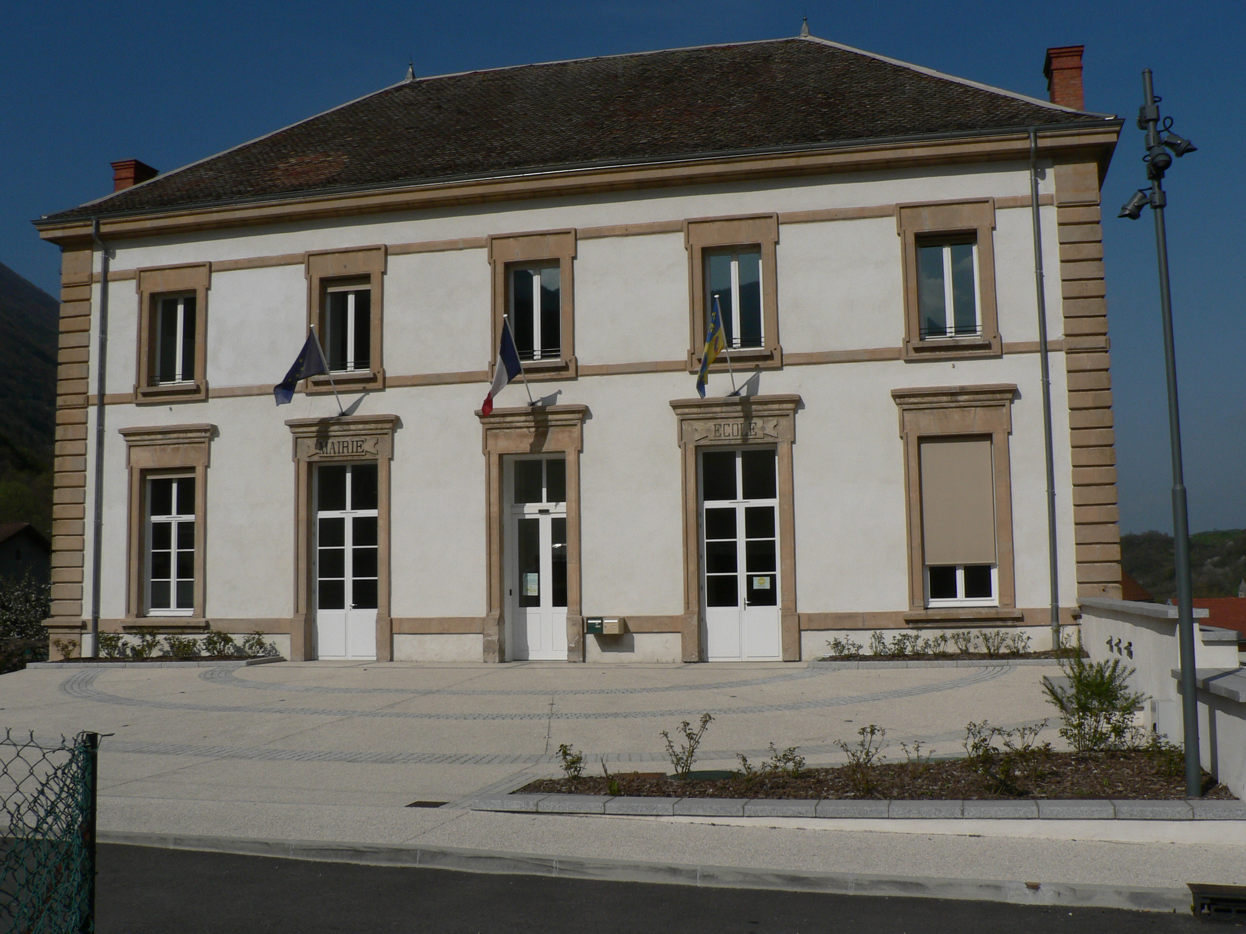 La Mairie du Gua